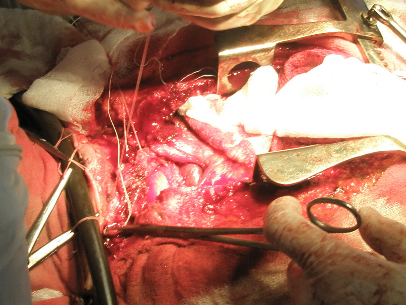 Полная продольная срединная стернотомия по поводу загрудинного зоба. Края грудины разведены ранорасширителем.